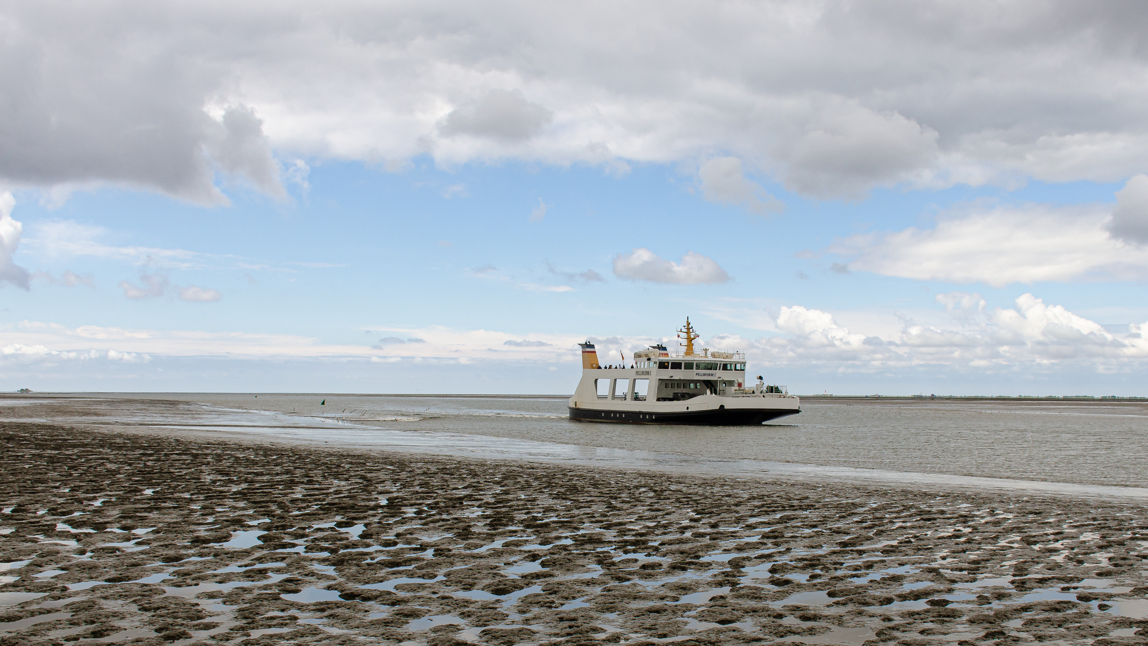 Fähre von Nordstrand nach Pellworm